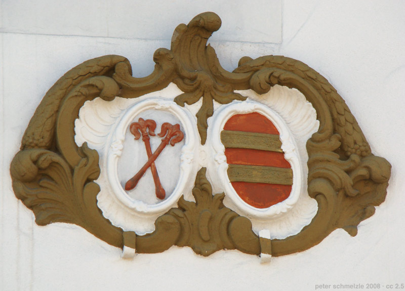 Venningensches Allianzwappen am Herrenhaus in Sinsheim-Weiler